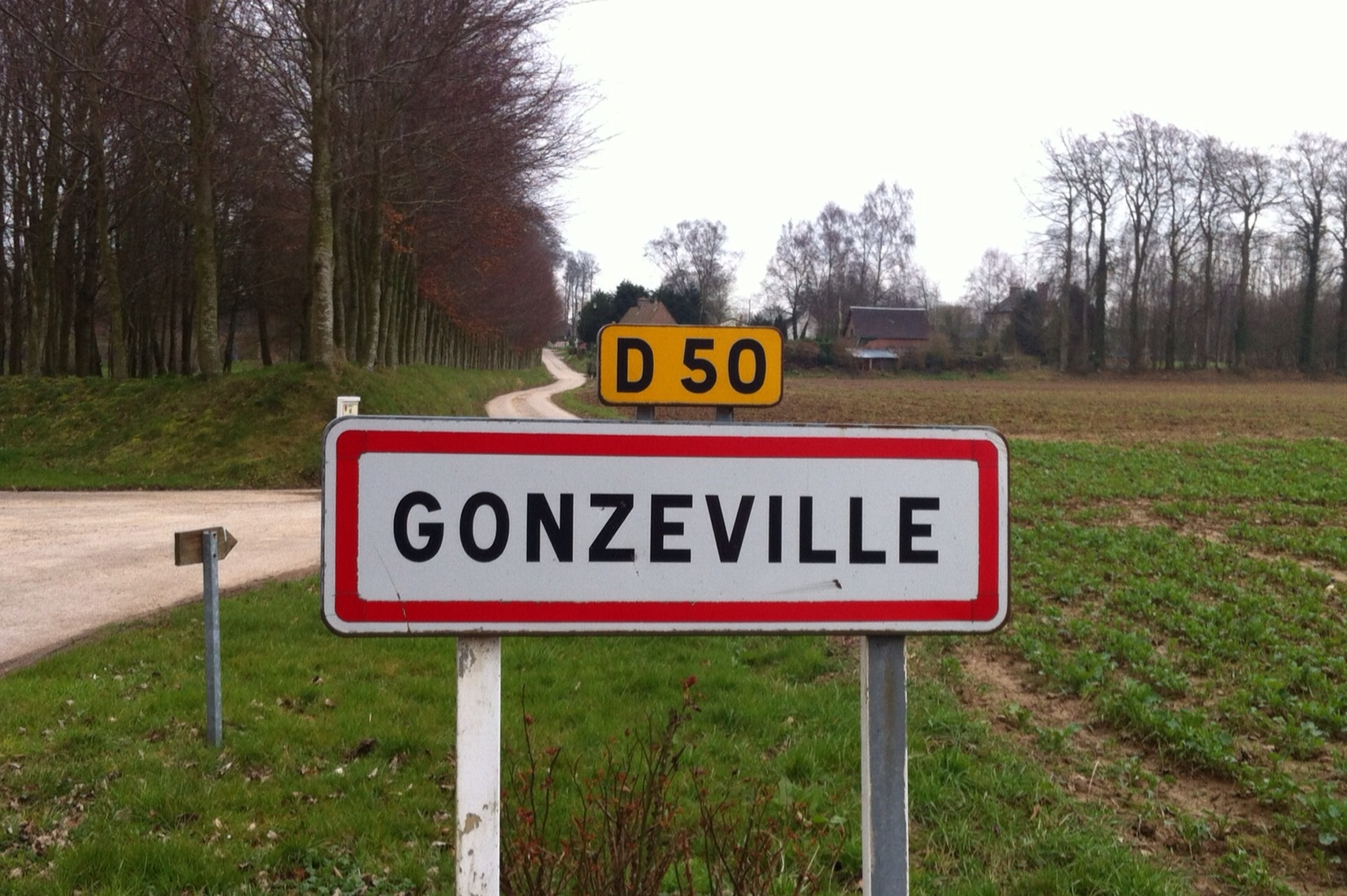 Panneau de la commune de Gonzeville